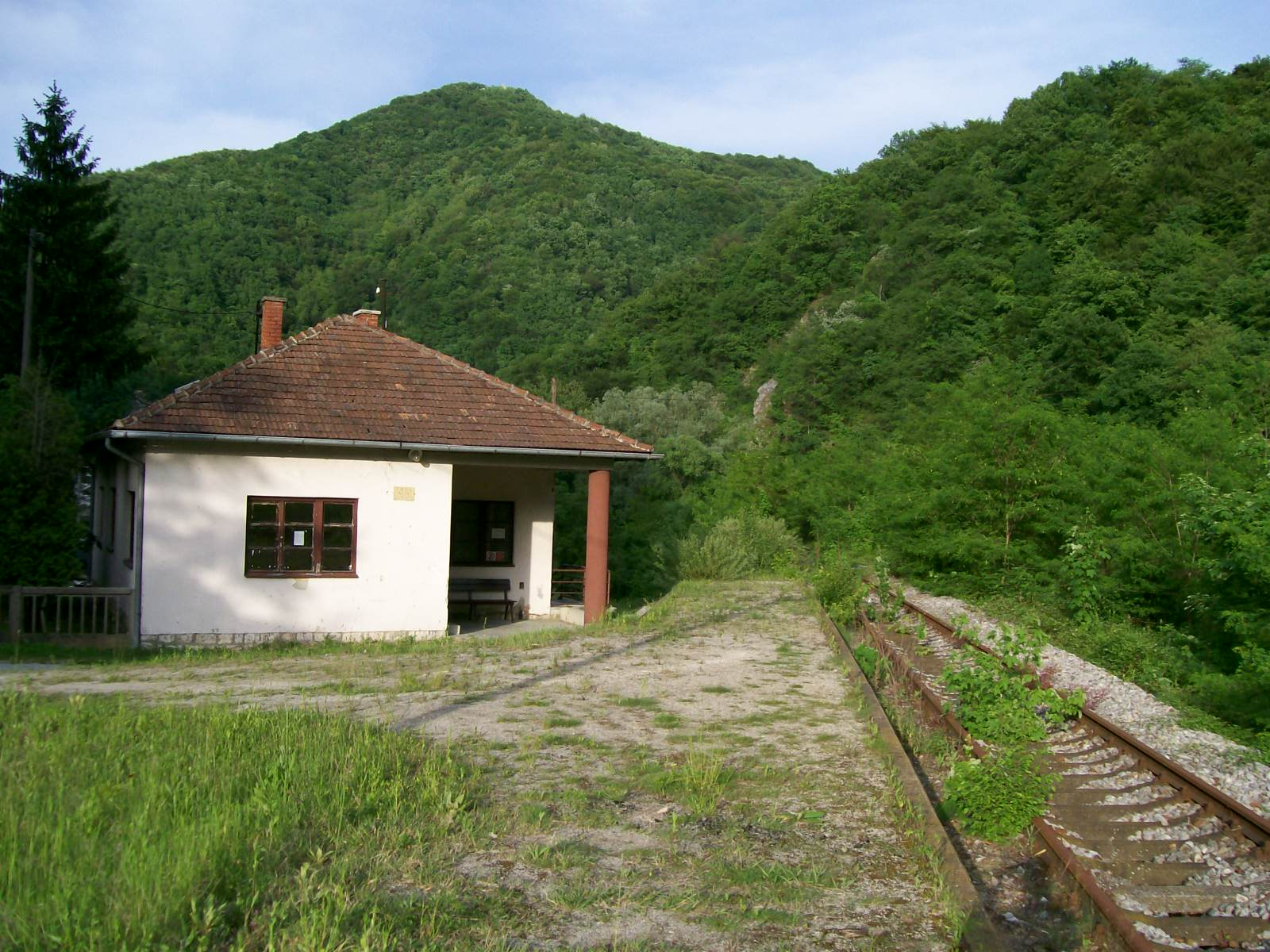 Željeznička stanica u Zelenjaku u svibnju 2008. godine, na pruzi Zagreb-Savski-Marof-Kumrovec